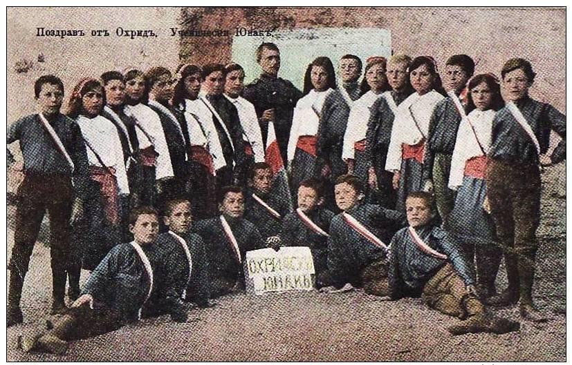 Българското дружество Охриски юнак.